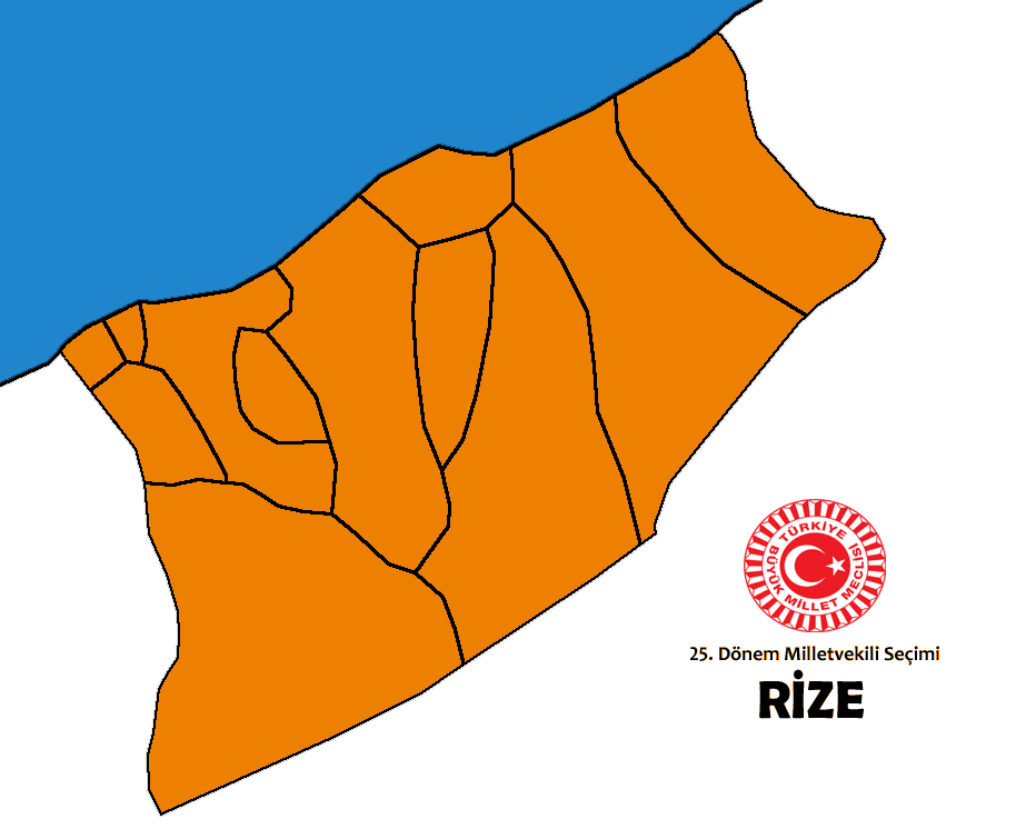 2015 genel seçim sonuçları